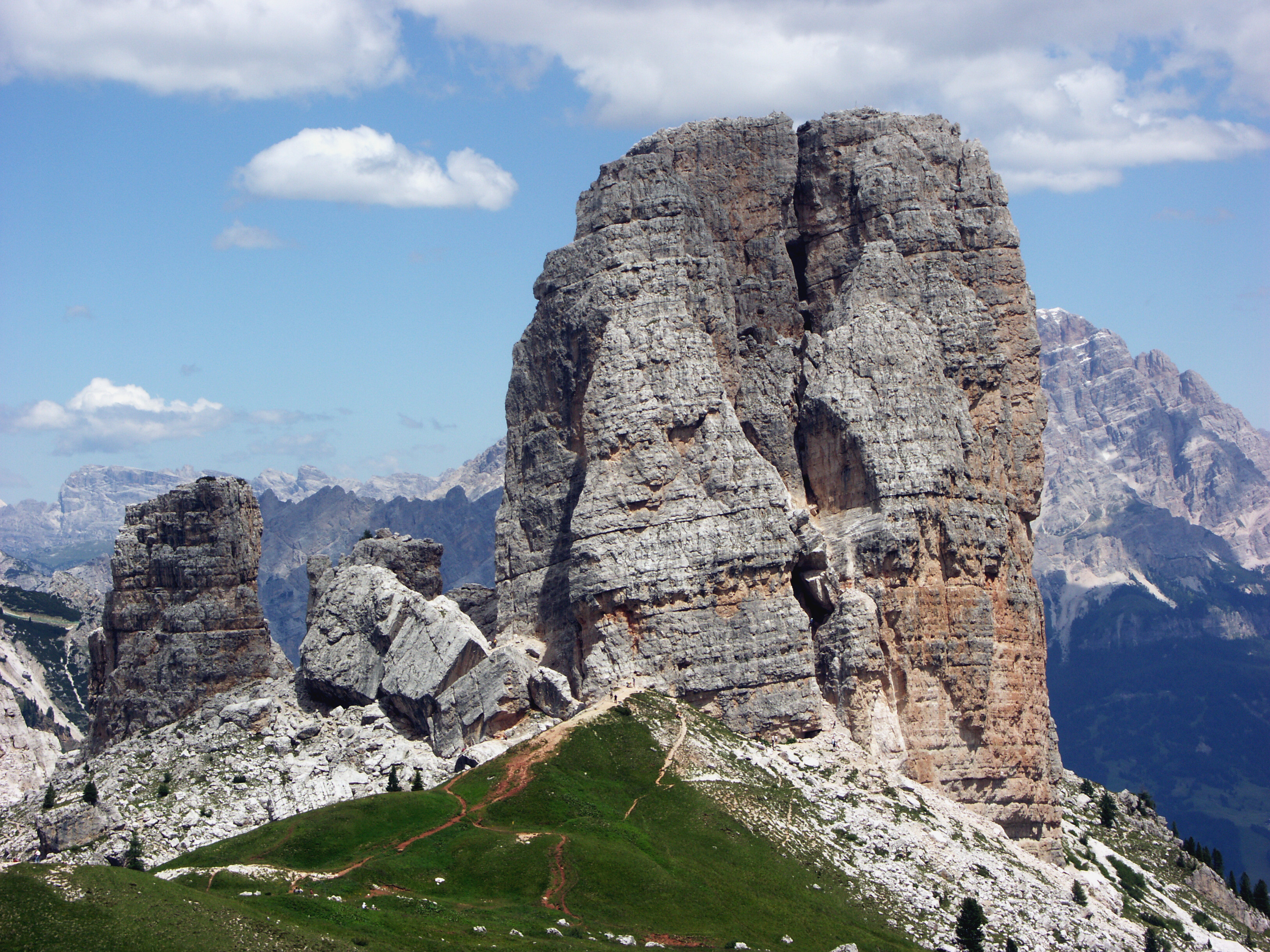 Italien, Dolomiten, die Cinque-Torri bei Cortina d'Ampezzo, Juli 2005